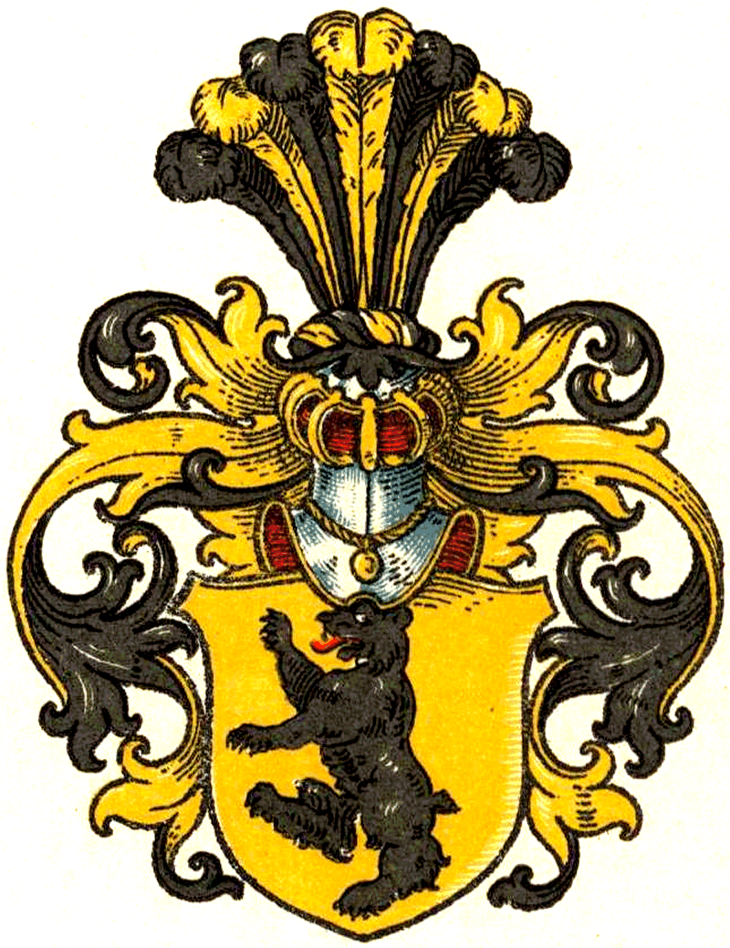 Wappen der von Roell (Röhl)